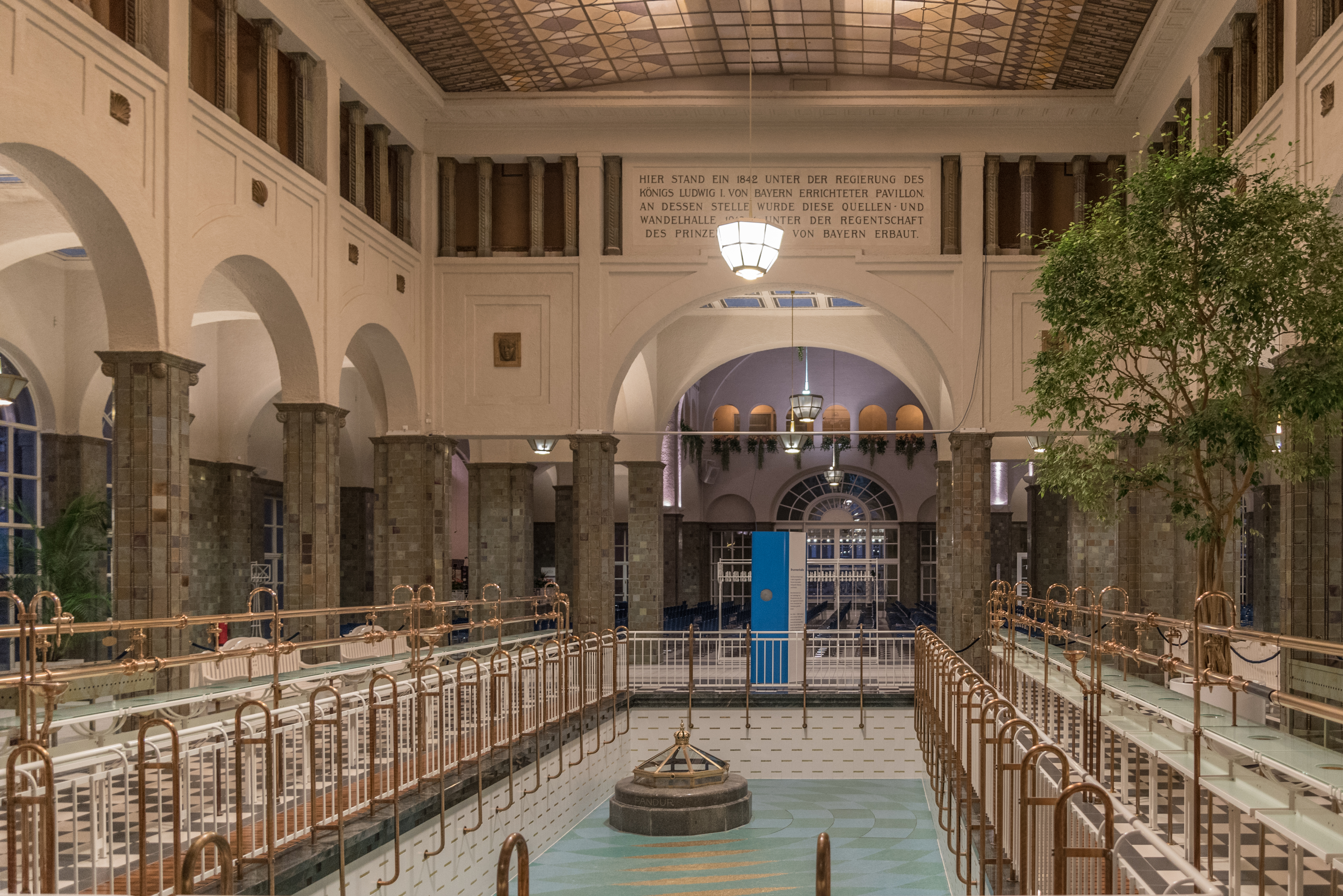 Bad Kissingen, Am Kurgarten 10, Brunnenhaus